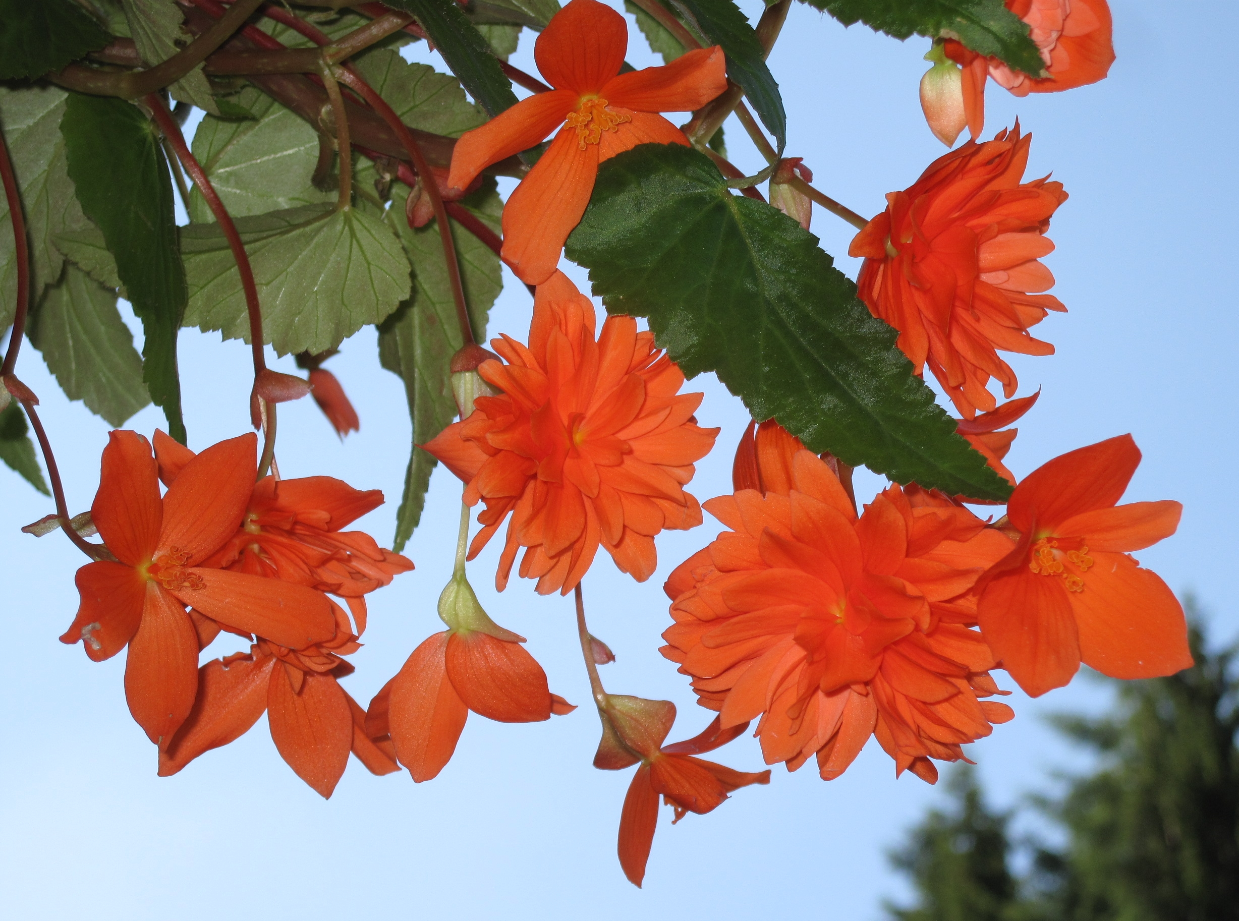 Verschiedenartigkeit der Blüten einer orangefarbenen Hängebegonie (Begonia tuberhybrida pendula).